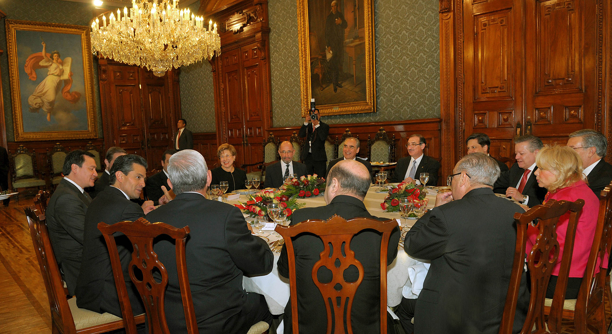 Reunión del presidente Enrique Peña Nieto con los once Ministros de la Suprema Corte de Justicia de la Nación.